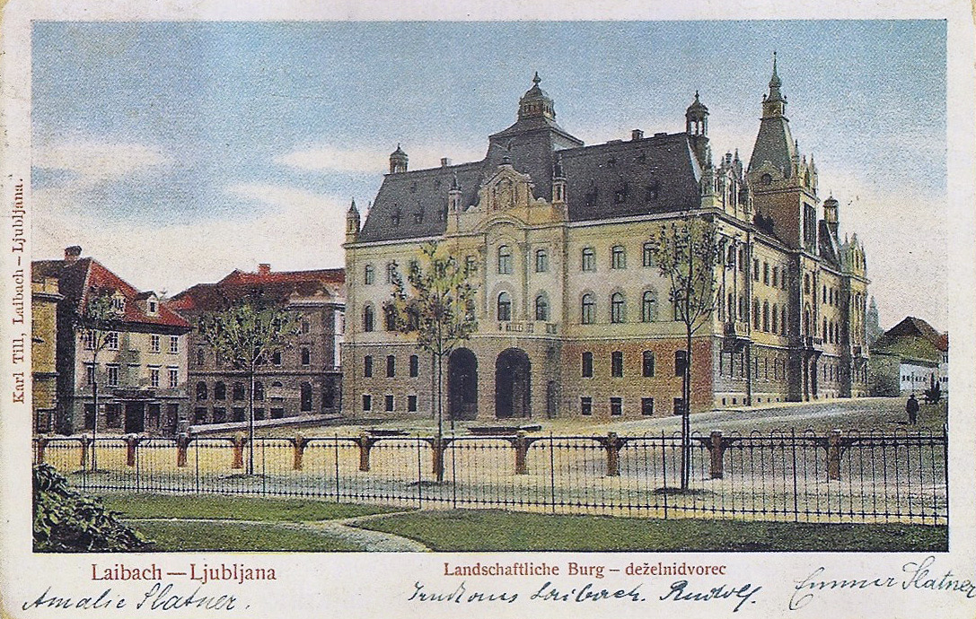 Razglednica deželnega dvorca v Ljubljani.